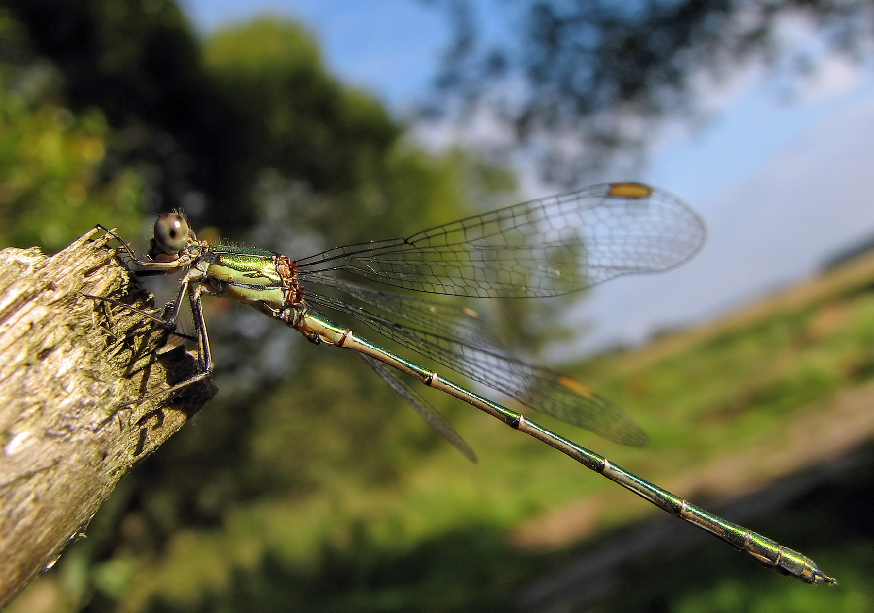 Beschreibung: Weidenjungfer (Chalcolestes viridis) Fotograf: Darkone, 30. August 2005